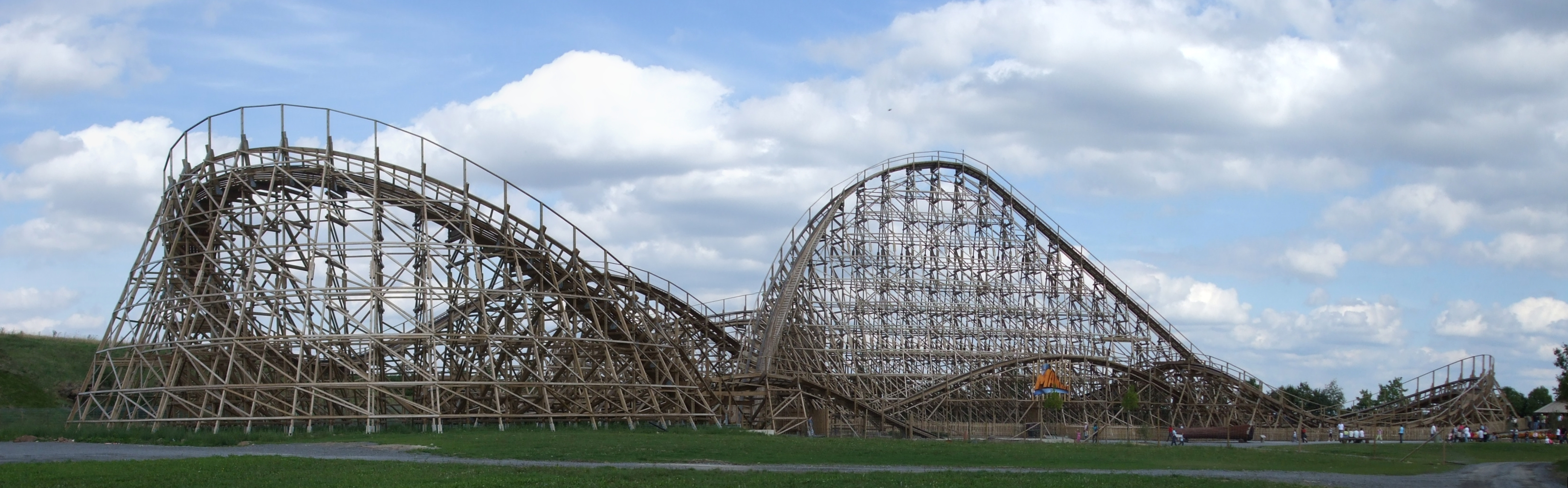 Holz-Achterbahn im Freizeitpark Tripsdrill /Cleebronn